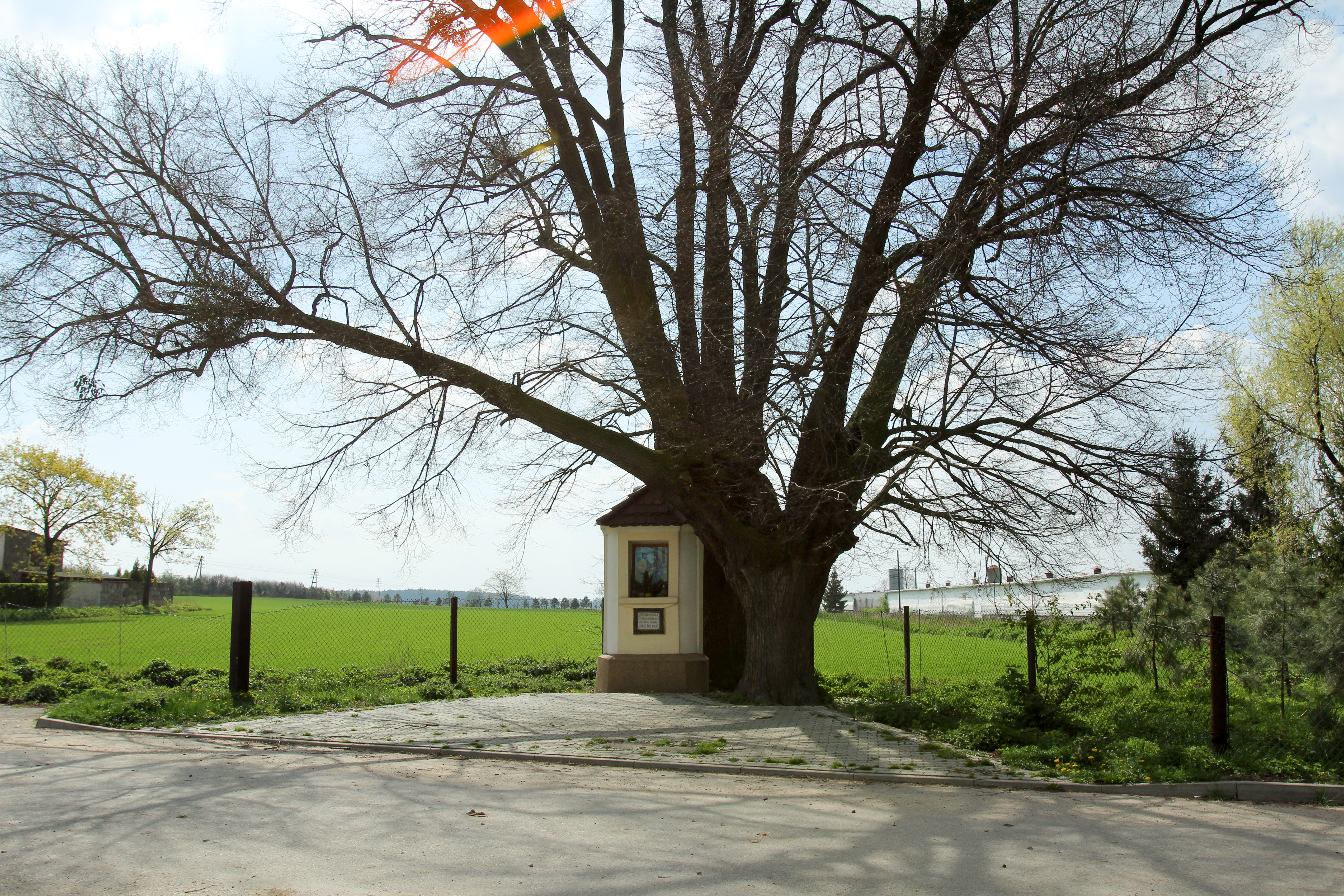 Mańkowice – wieś w Polsce położona w województwie opolskim, w powiecie nyskim, w gminie Łambinowice.